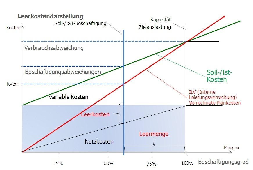 Leerkostenschema aus meinem Vortrag Leerkosten im Unternehmen